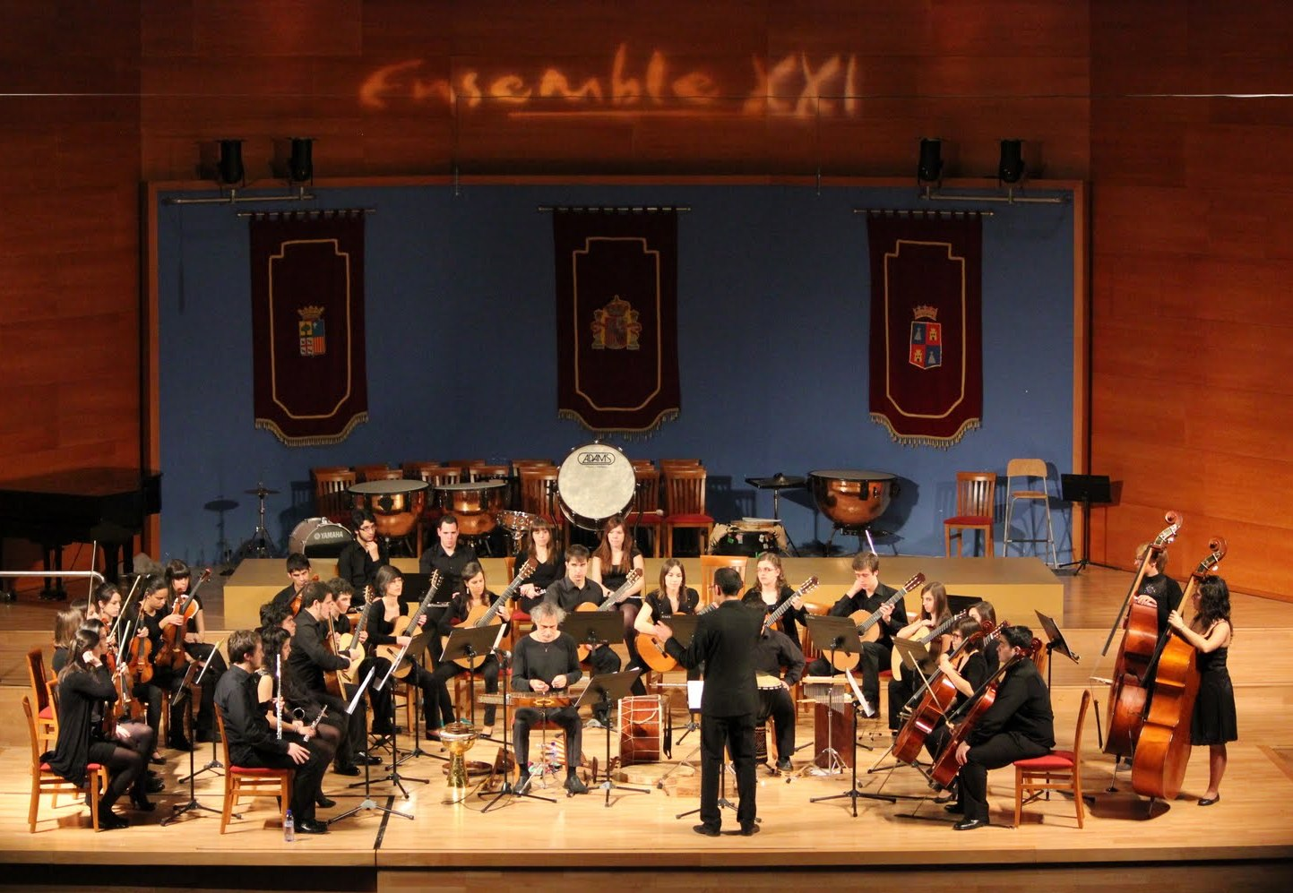 Concierto "La magia de la danza" dentro del X Aniversario de Ensemble XXI con Dimitri Psonis como Invitado de Honor